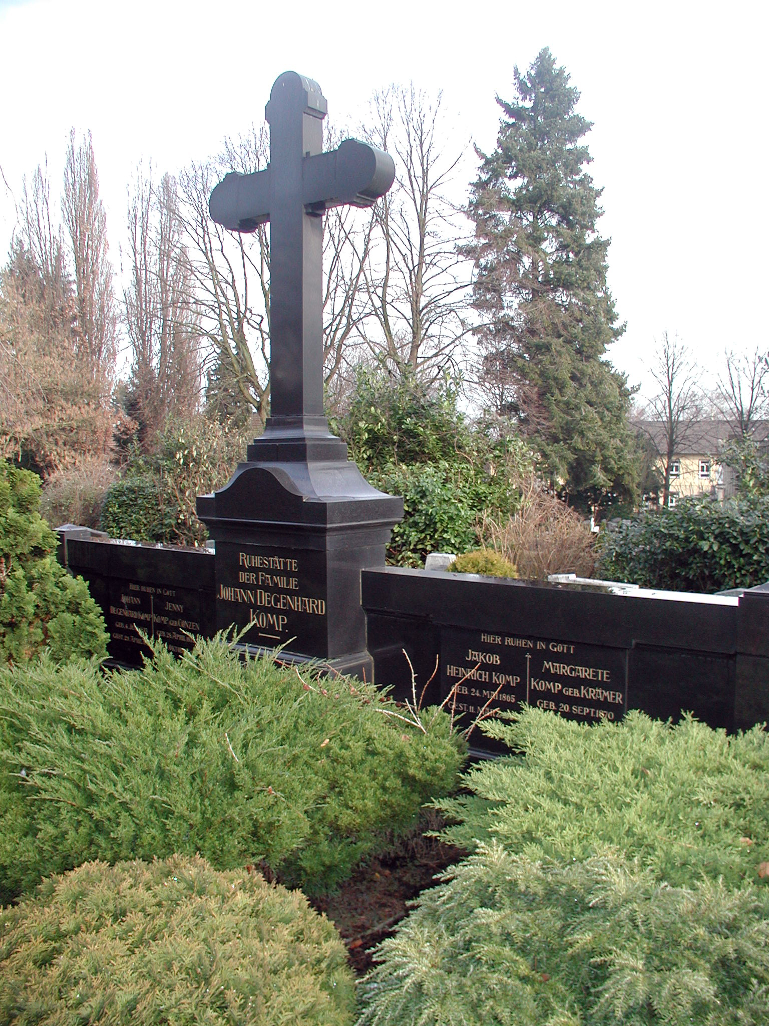 Brühl-Vochem, Kirchhof, Alte Grabstätte